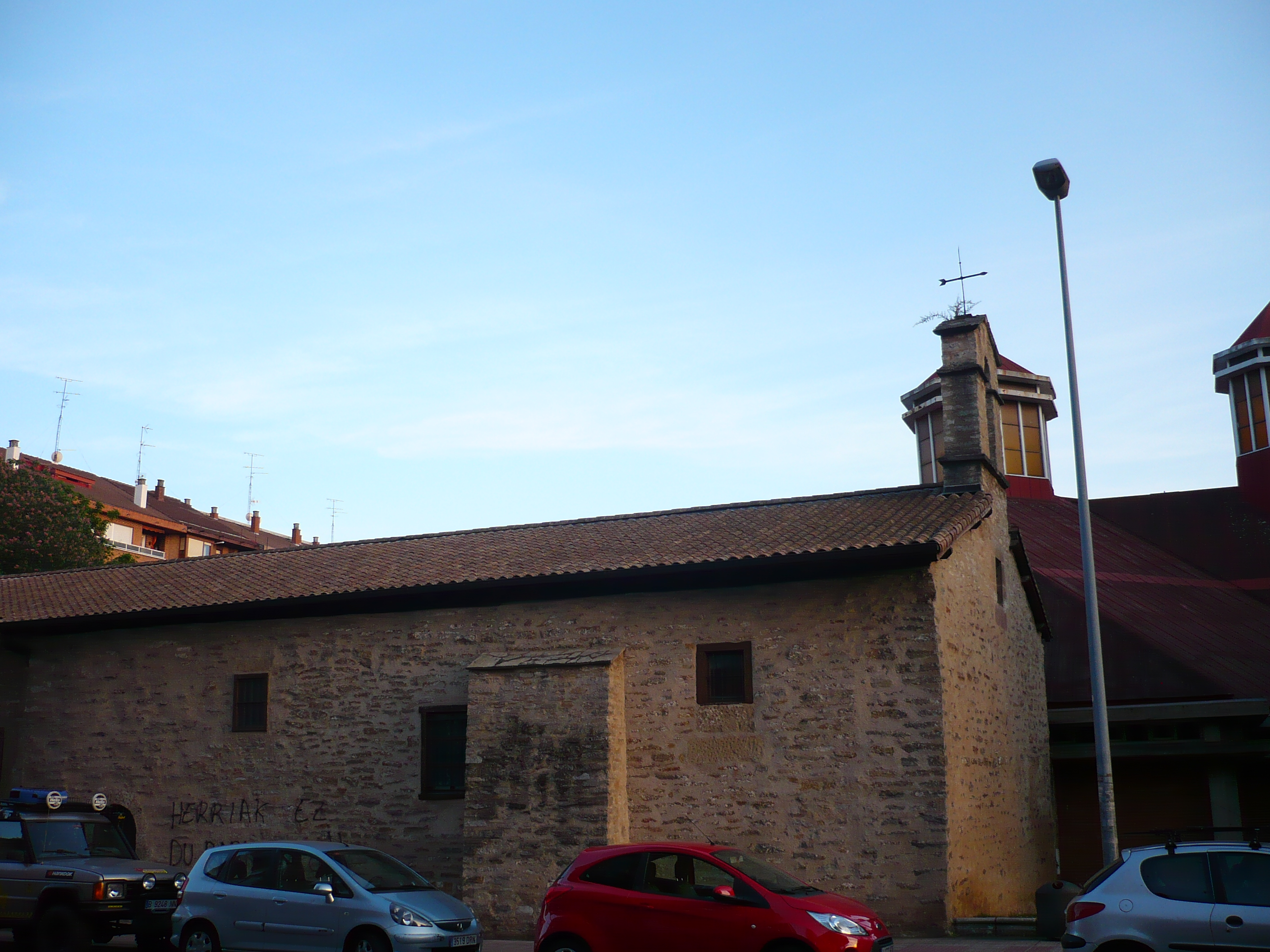 Ermita en Vitoria.